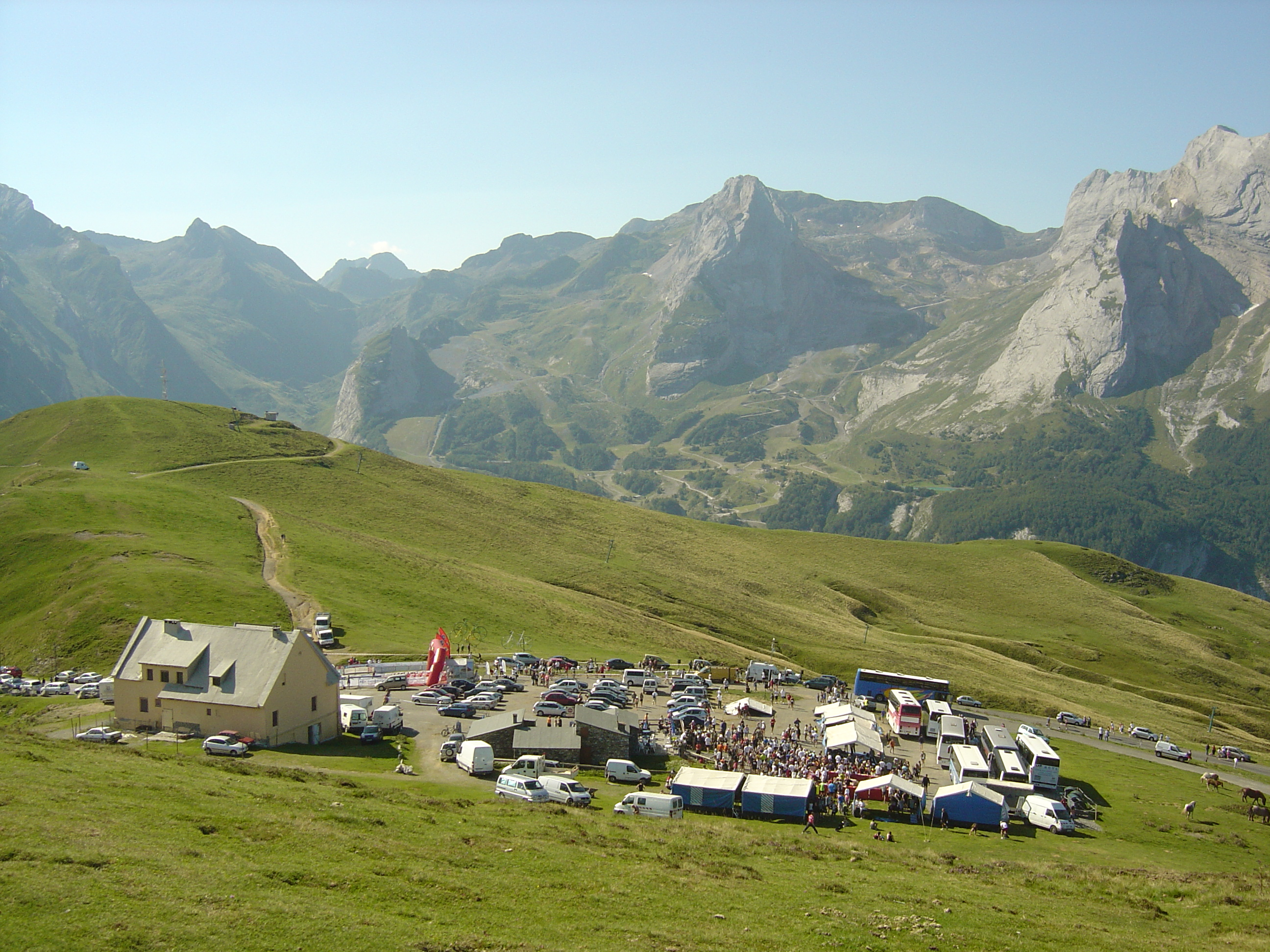 Le col d'Aubisque le jour de la montée de l'Aubisque (course de montagne) le 23-08-2009